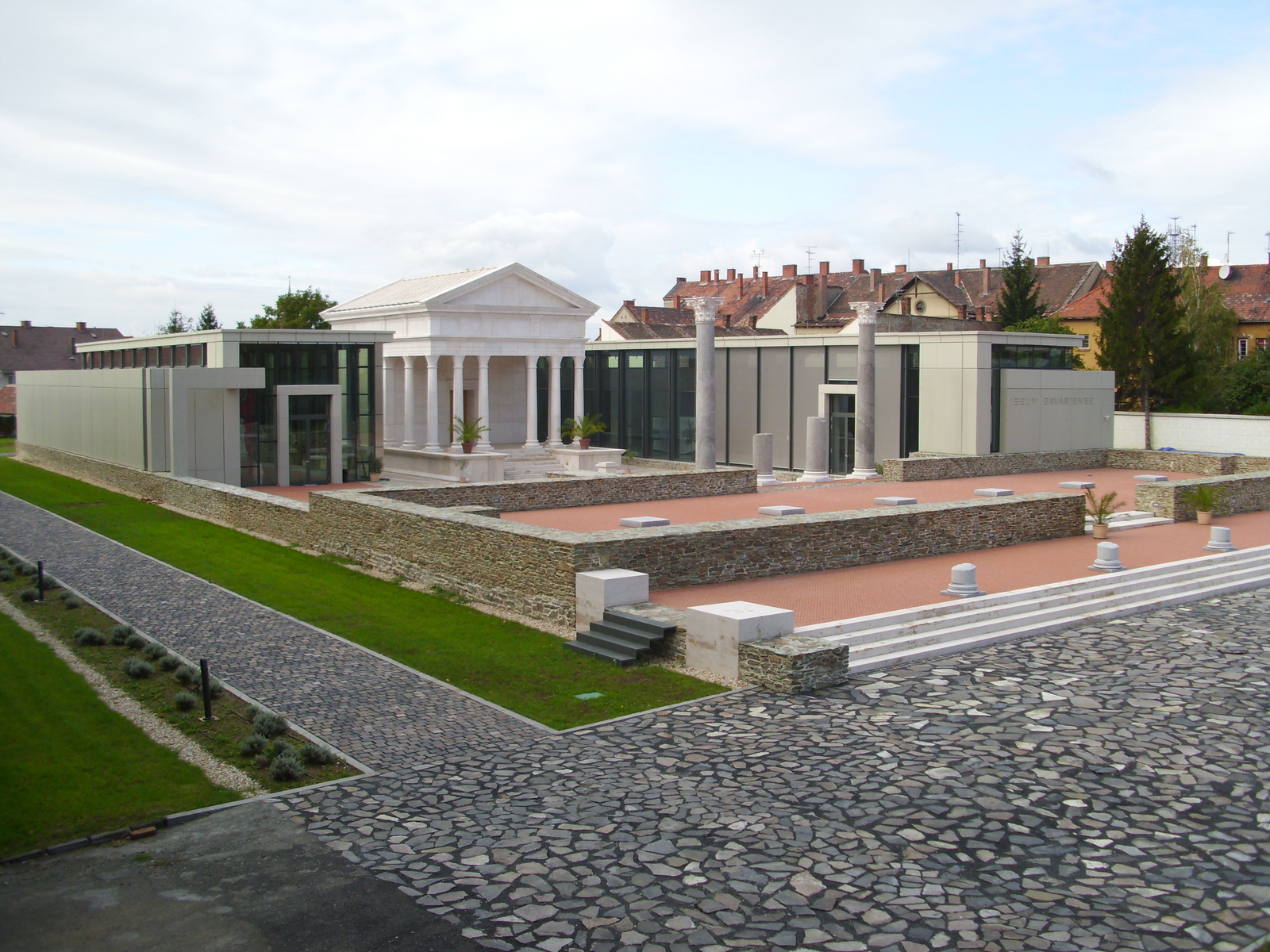 Iseum (Szombathely, Zrínyi Ilona utca 9.) This is a photo of a monument in Hungary, Identifier: 9446